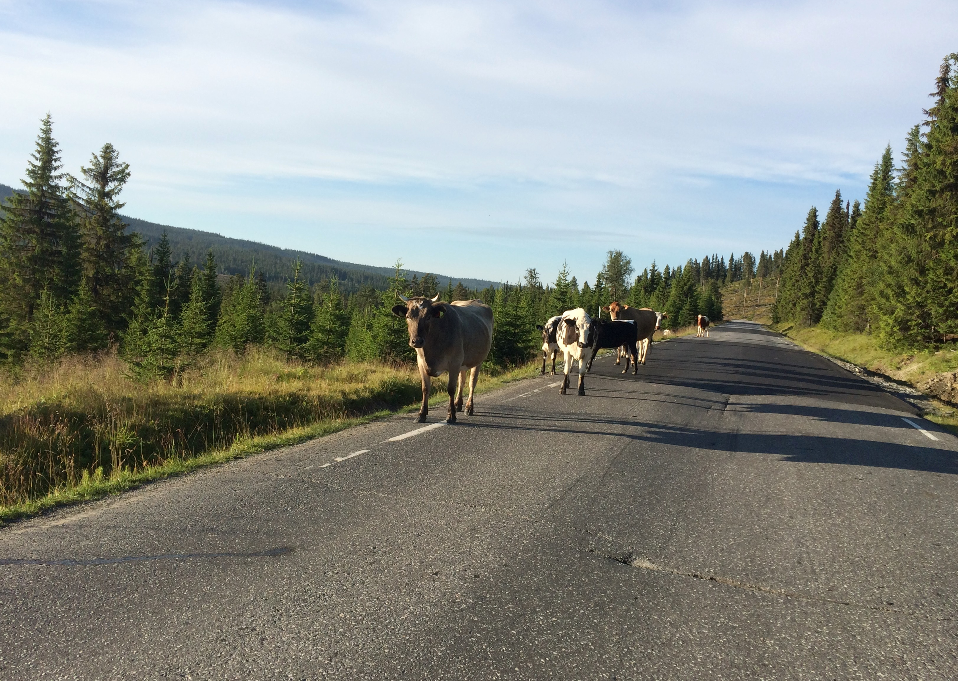 Fylkesvei 51 øst for Tisleidalen, på vei mot Golsfjellet